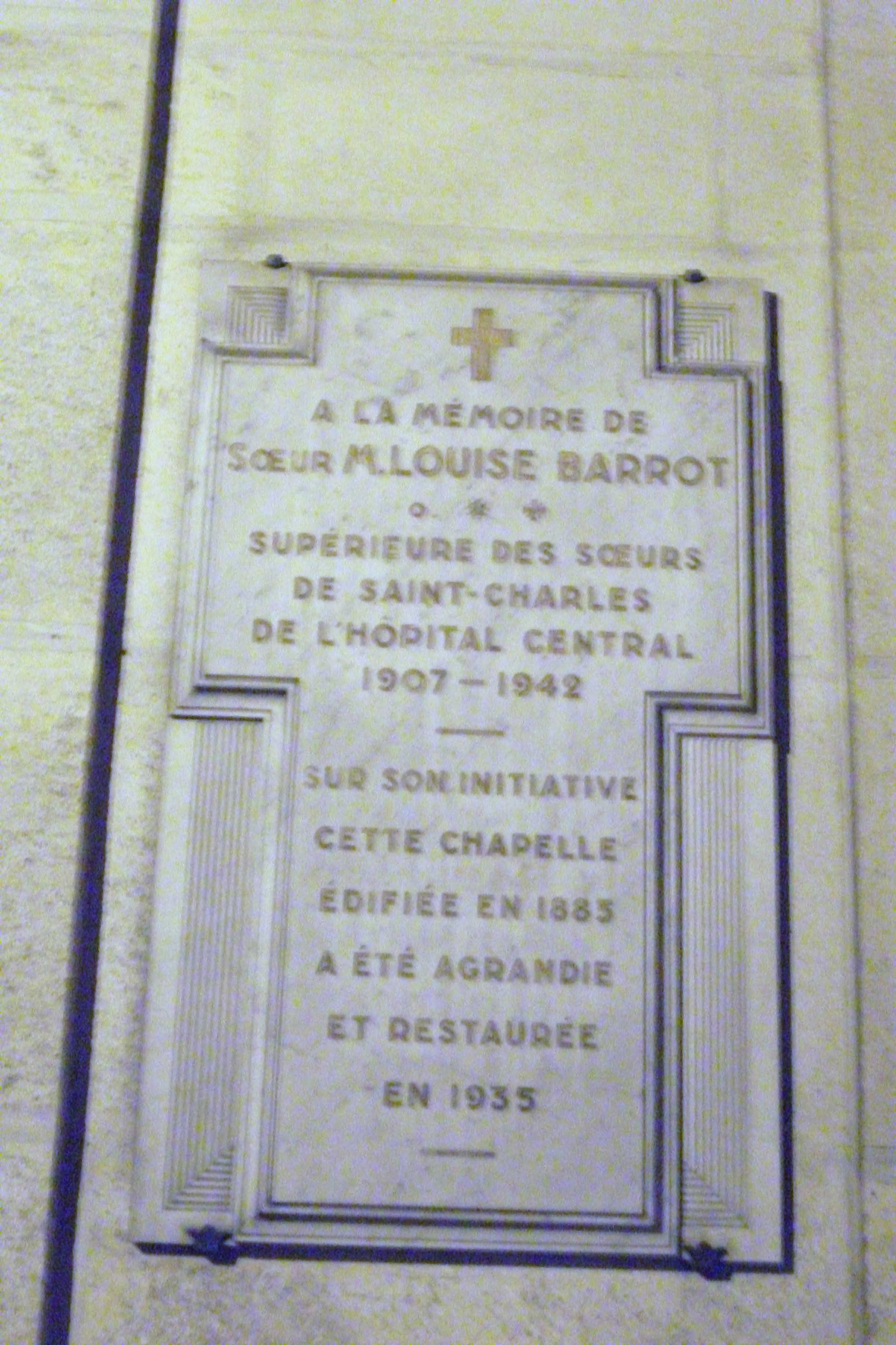 à l'entrée de la Chapelle_de l'Hopital Central de Nancy, plaque en l'hommage de Louise_Barrot.